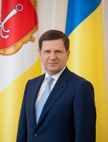 фото мэра Одессы